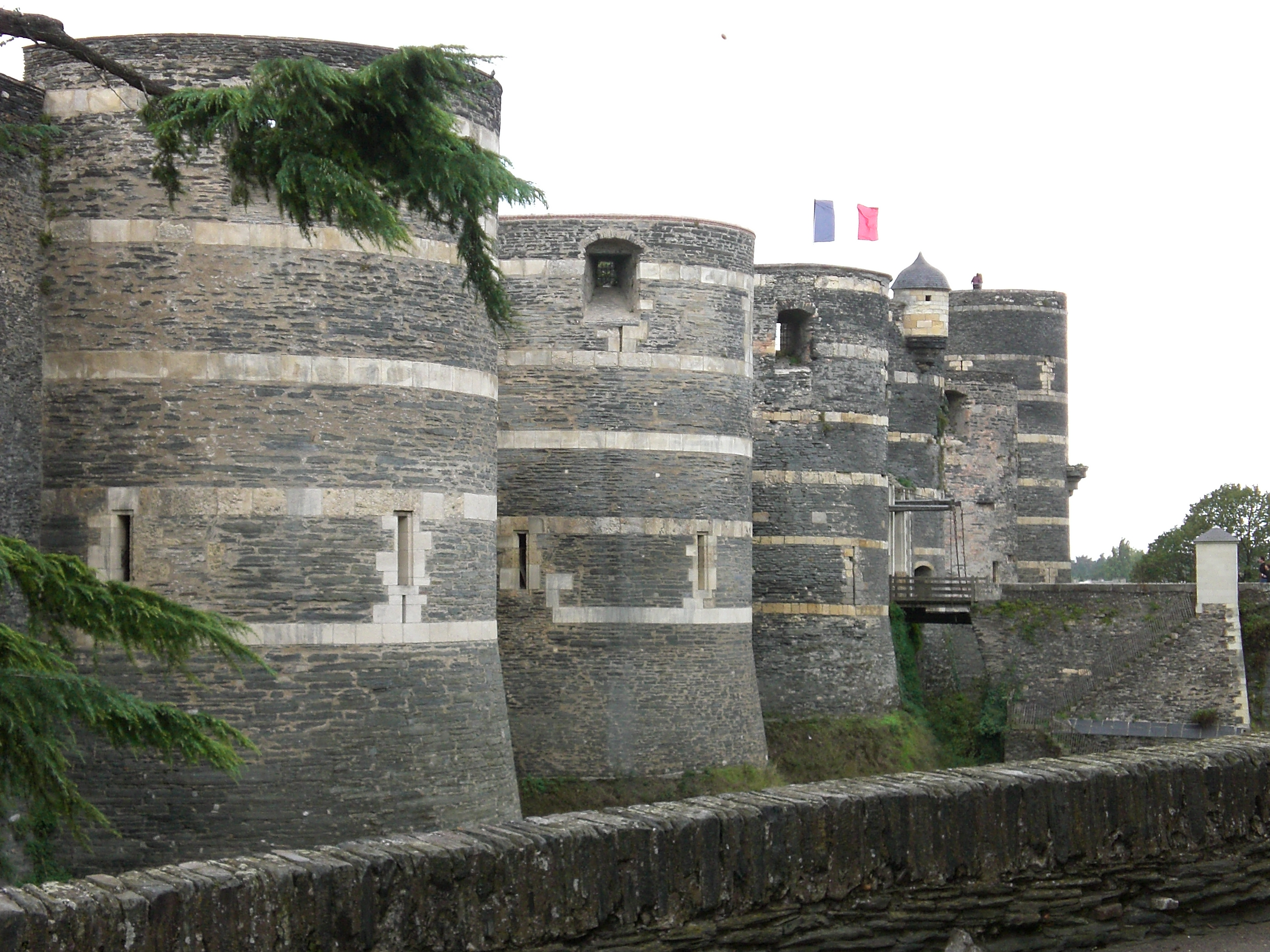 Succession de tours du Château d'Angers avec l'avancé qui constitue l'accès à l'intérieur de l'édifice. It is indexed in the Base Mérimée, a database of architectural heritage maintained by the French Ministry of Culture, under the references IA49000839 and PA00108871.